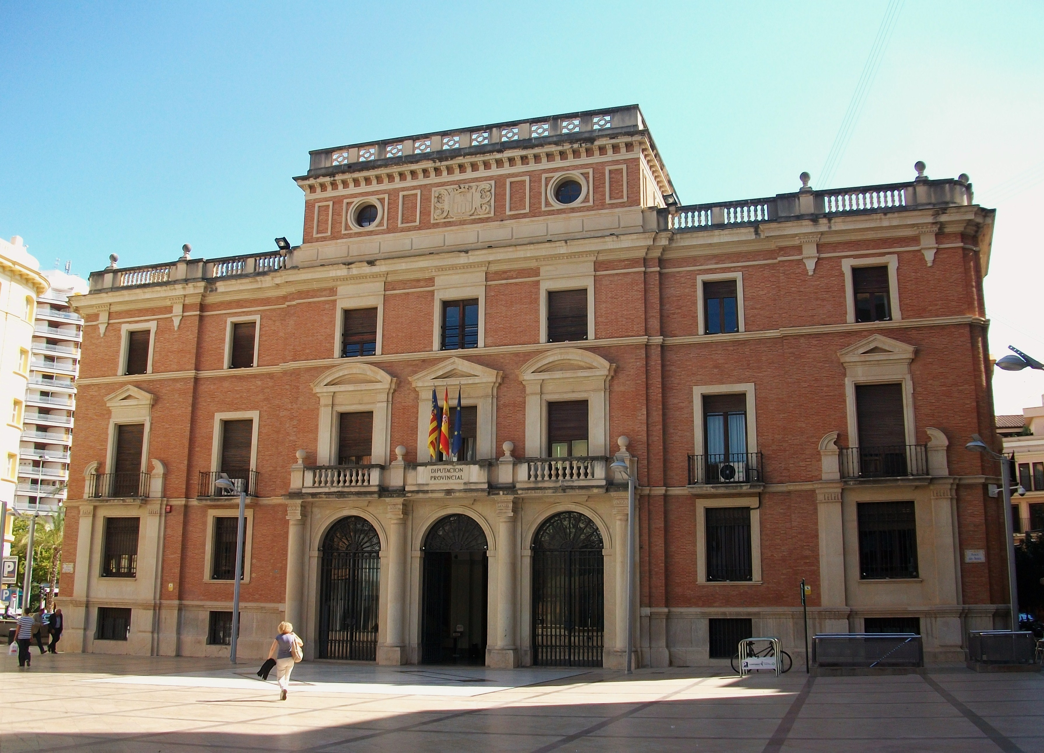 Edifici de la Diputació Provincial de Castelló de la Plana.